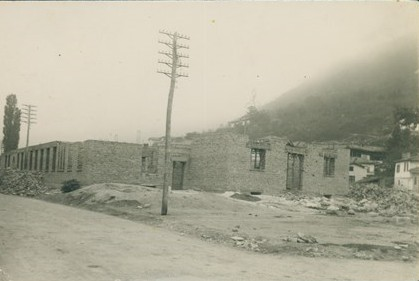 Строежът на сградата на театъра в Провадия.